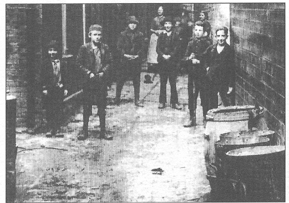 Mullen's Alley, New York.